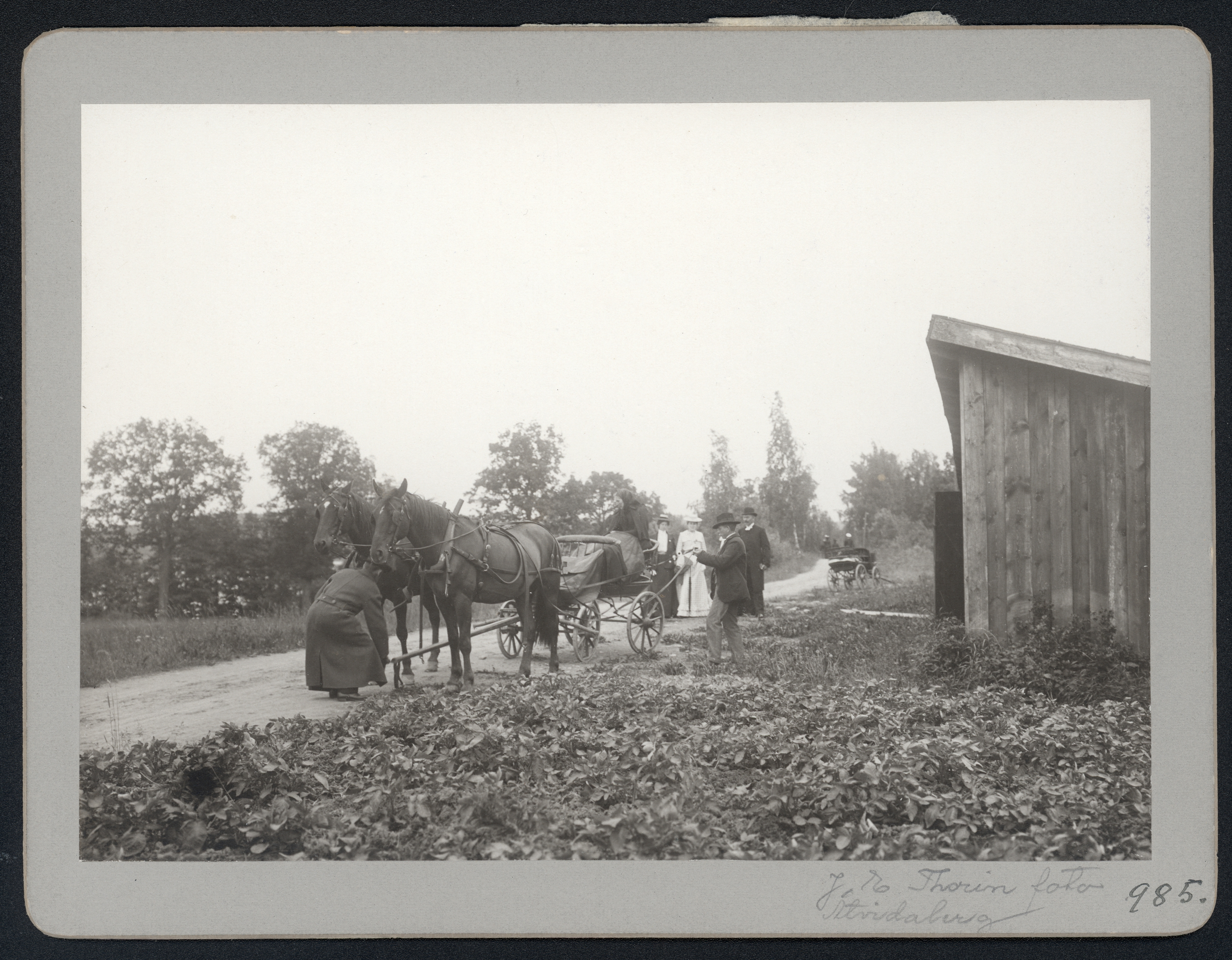 Småland. Norra Tjust hd. Hannäs sn. ”Vid kyrkstallarna 13 juli 1902”.